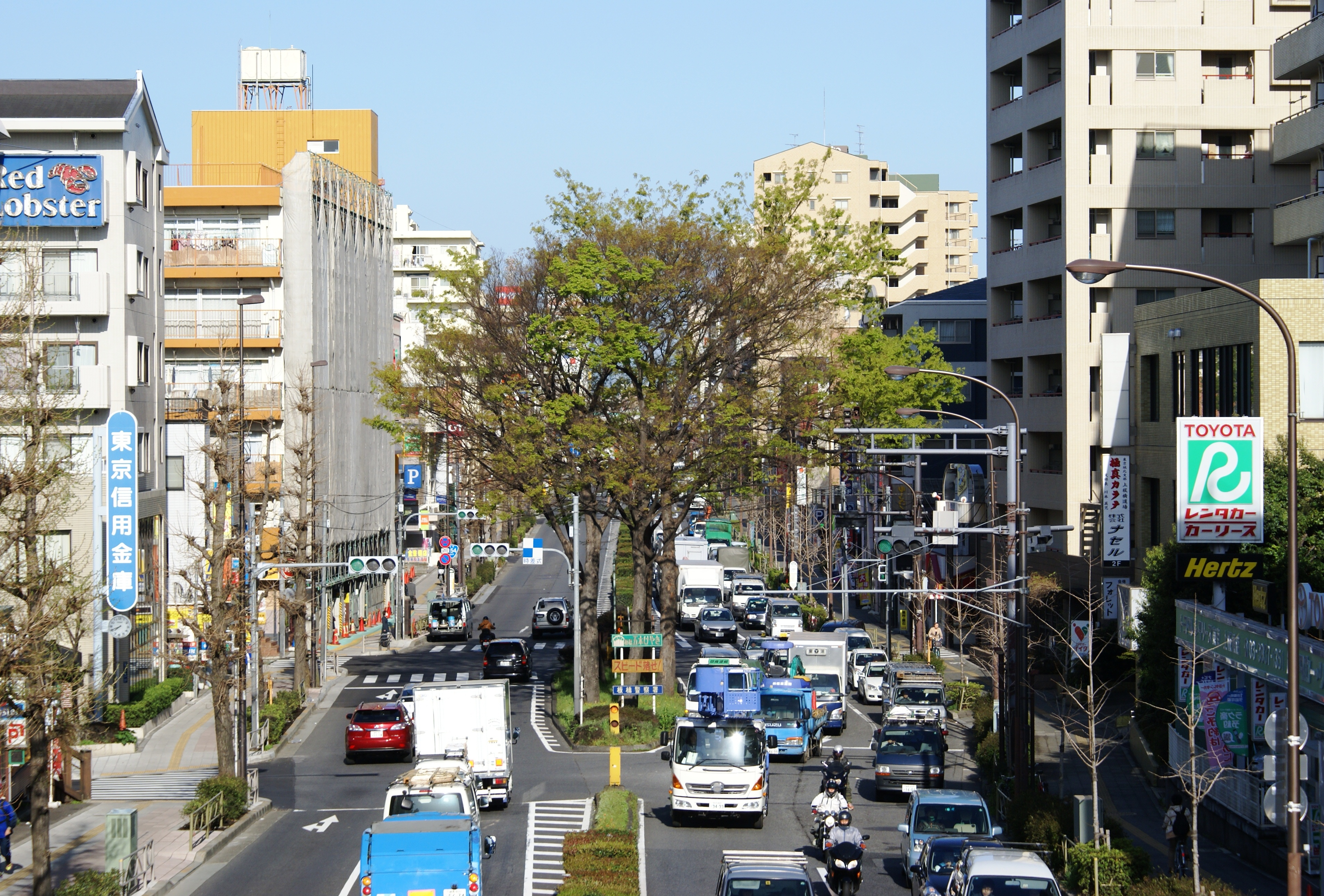 国道254号の五本けやき